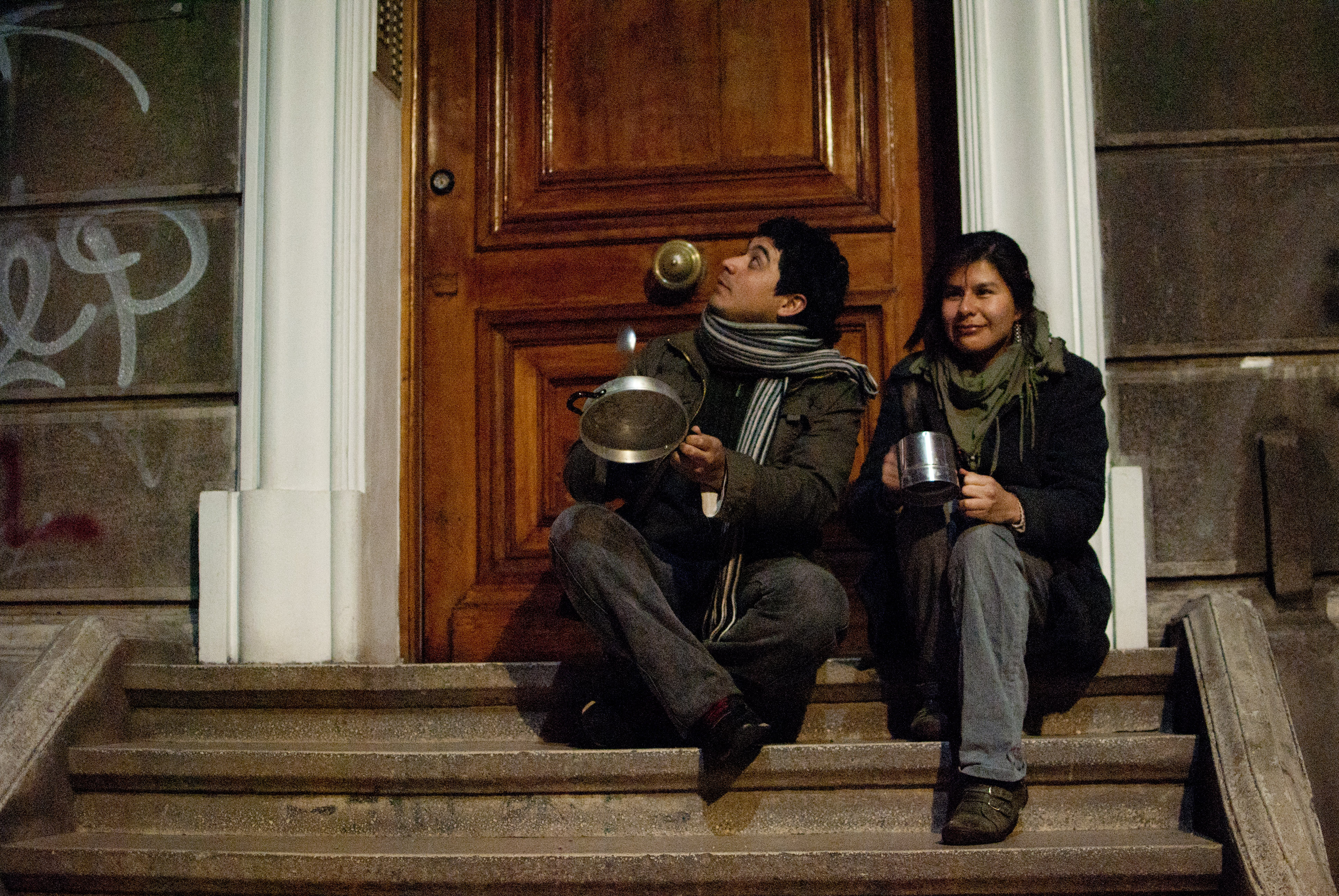 Protestas en Santiago el 4 de agosto de 2011, durante las movilizaciones estudiantiles en Chile. Yo caceroleo, tú caceroleas.